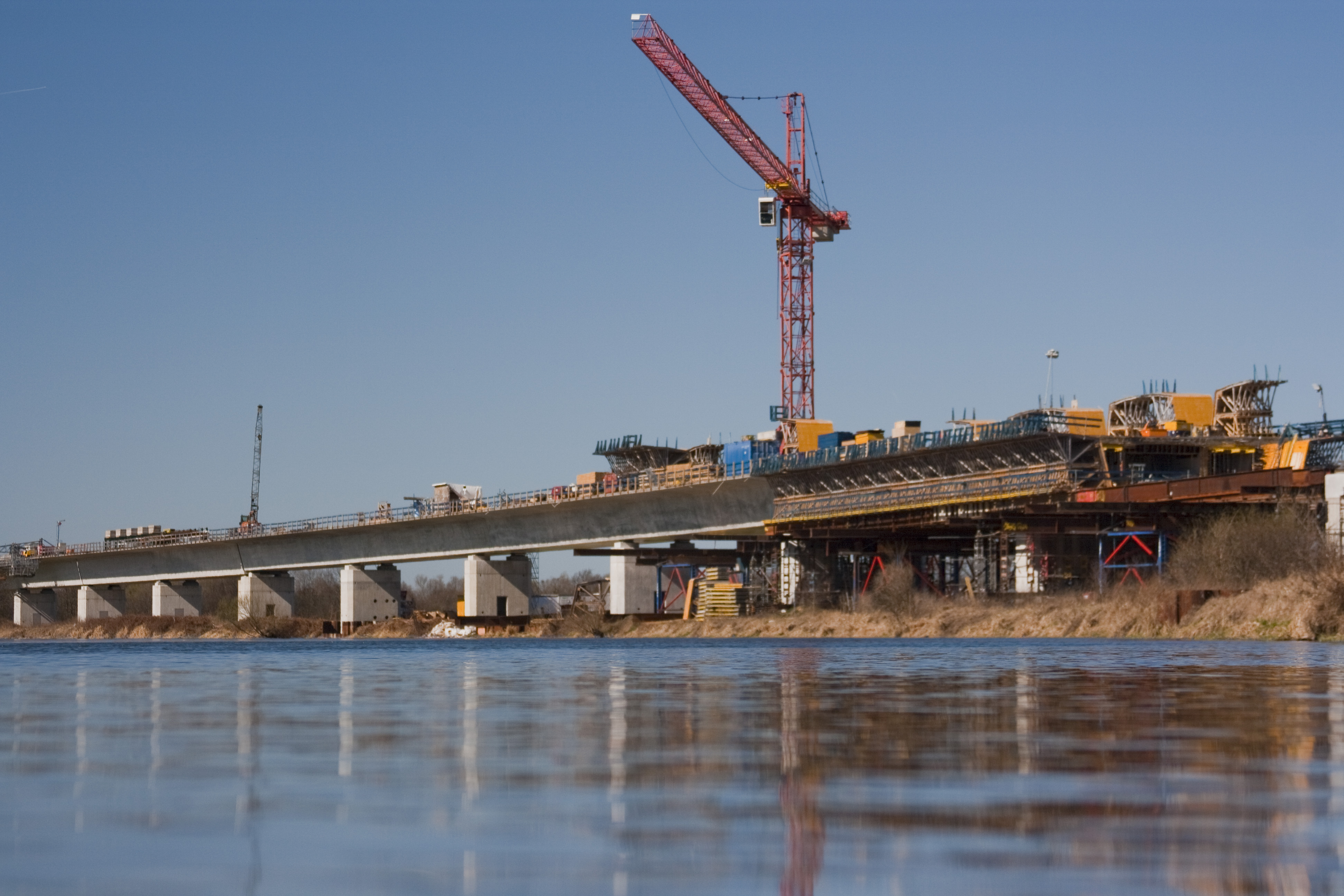 ICE Neubaustrecke Erfurt - Leipzig/Halle - Saale-Elster-Talbrücke